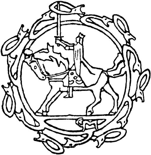 Gerhard Munthe: Illustration for Magnus Erlingssons saga, Heimskringla 1899-edition. Sluttvignett.